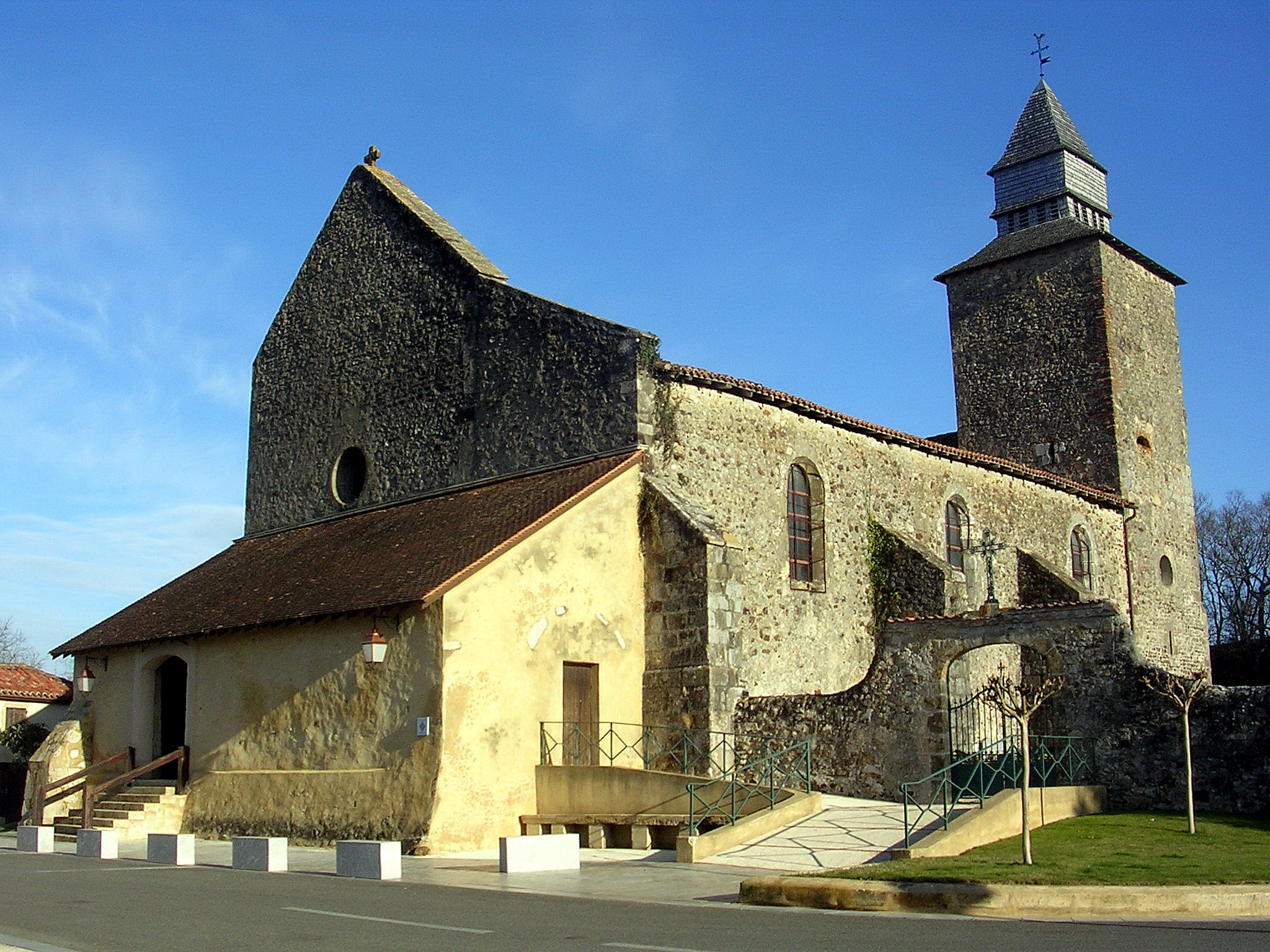 Eglise de Nerbis, en Chalosse (département des Landes, France)